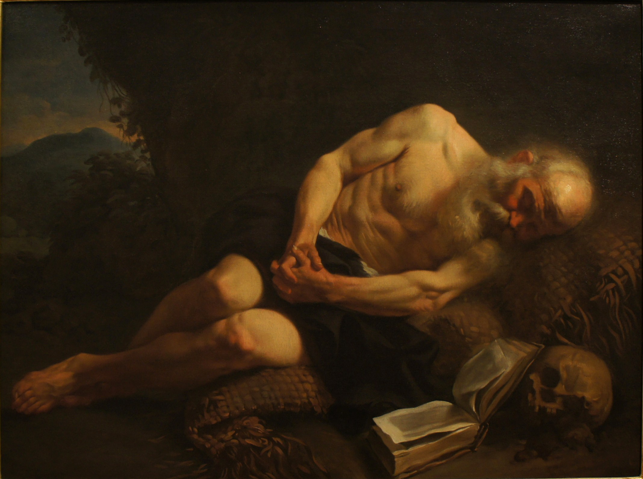 Anchorite asleeplabel QS:Len,"Anchorite asleep" label QS:Lfr,"Anachorète endormi"